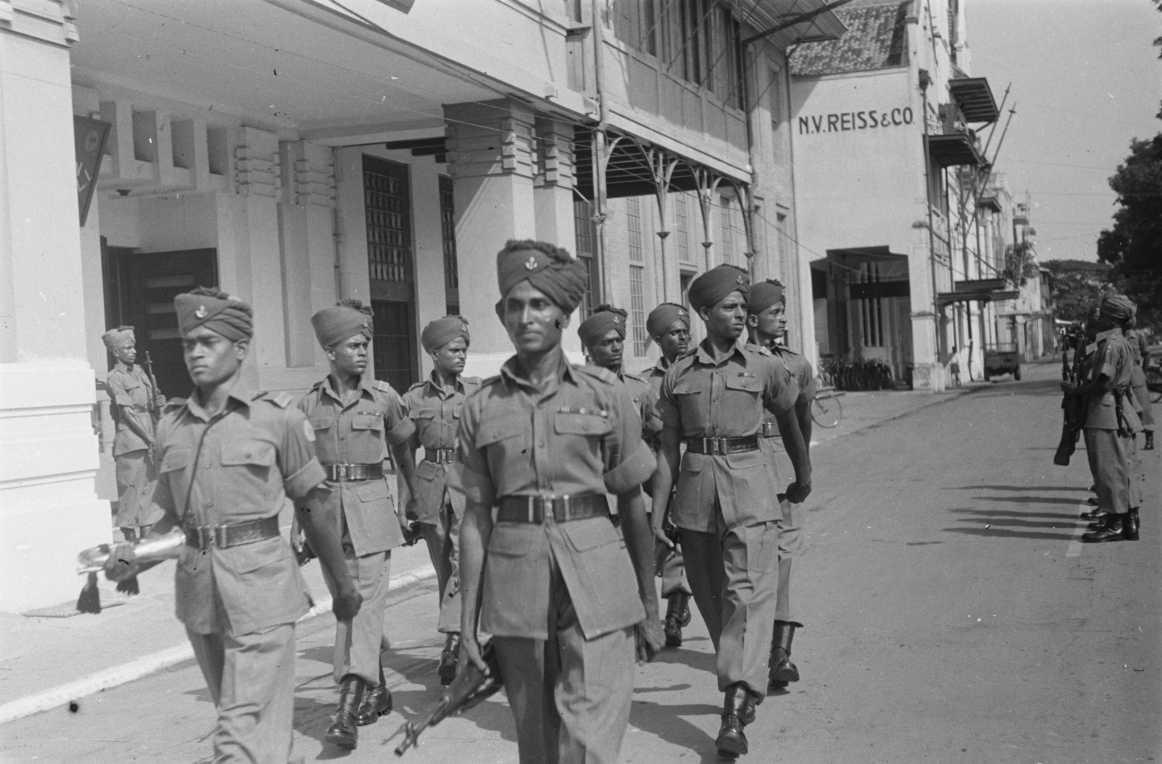 Collectie / Archief : Fotocollectie Dienst voor Legercontacten Indonesië Reportage / Serie : [DLC] Aflossing wacht Mahrattas Beschrijving : Brits-Indiërs van het 6th Battalion the Mahratta Light Infantry Datum : 23 november 1946 Locatie : Batavia, Indonesië, Jakarta, Nederlands-Indië Fotograaf : Fotograaf Onbekend / DLC Auteursrechthebbende : Nationaal Archief Materiaalsoort : Negatief (zwart/wit) Nummer archiefinventaris : bekijk toegang 2.24.04.03 Bestanddeelnummer : 100A-1-4